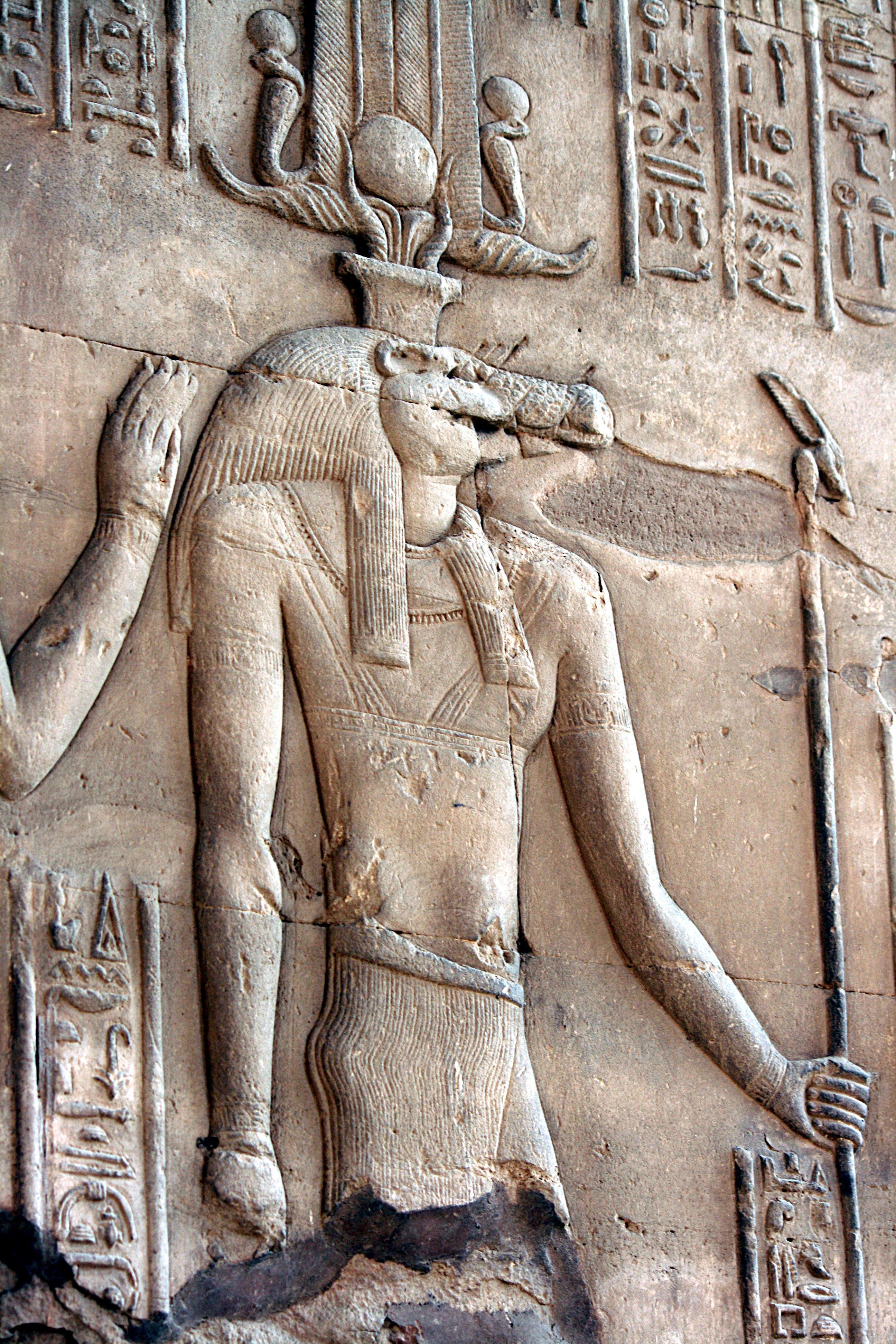 Tempel von Kom Ombo: Relief des Krokodilgottes Sobek